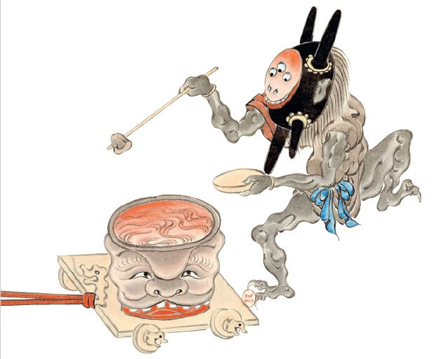 Détail du Hyakki Hyagyo Emaki entreposé à la Bibliothèque nationale de France (Fonds Smith-Lesouëf K21).